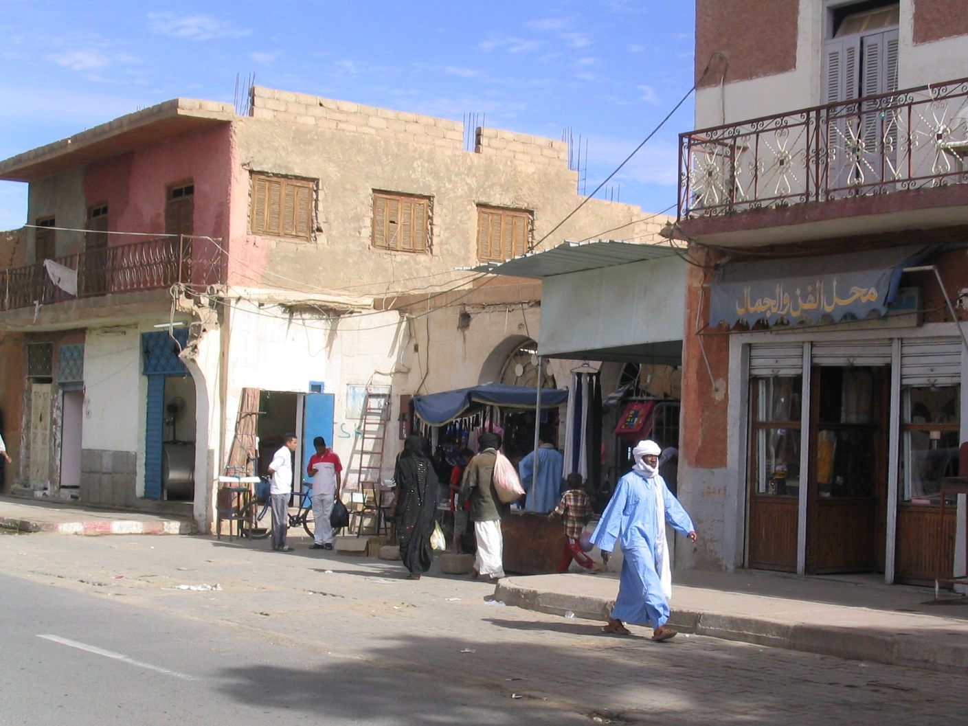 Scène de rue de Tamanrasset